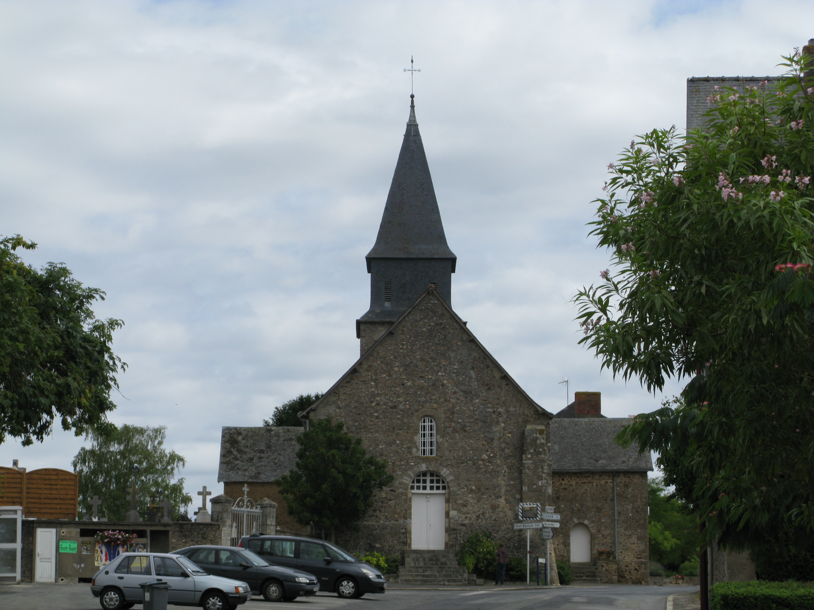 L'église